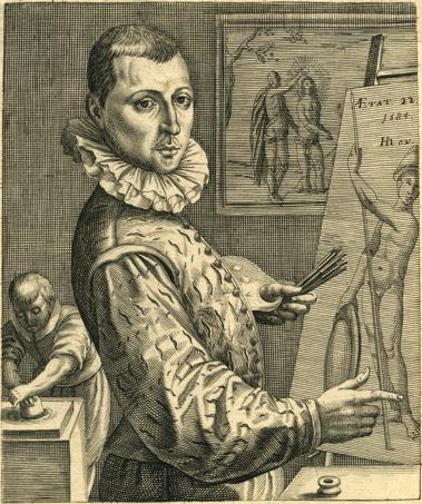 Portrait of Cornelis Cornelisz. van Haarlem